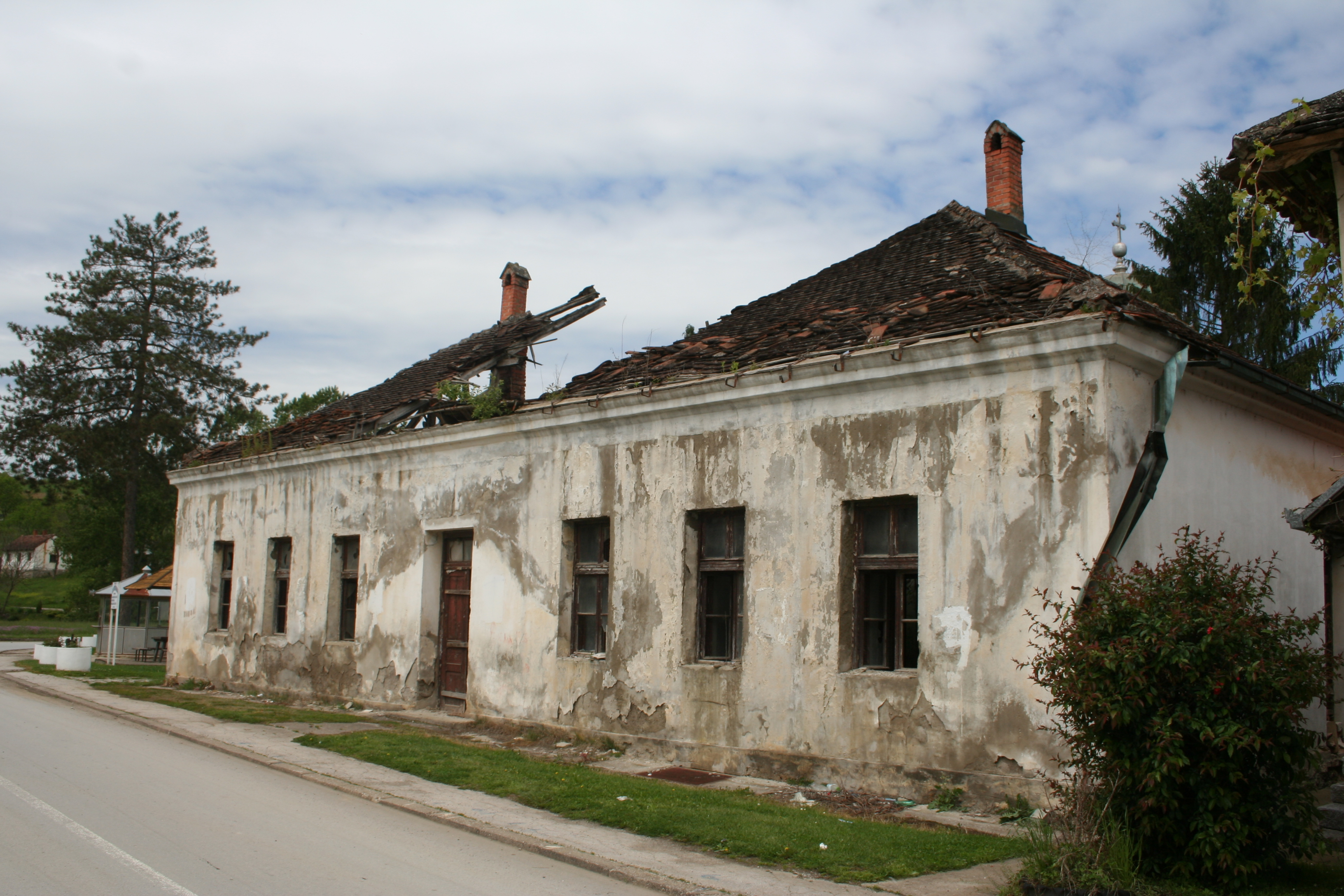 Zgrada stare škole u Beloj Crkvi, Krupanj